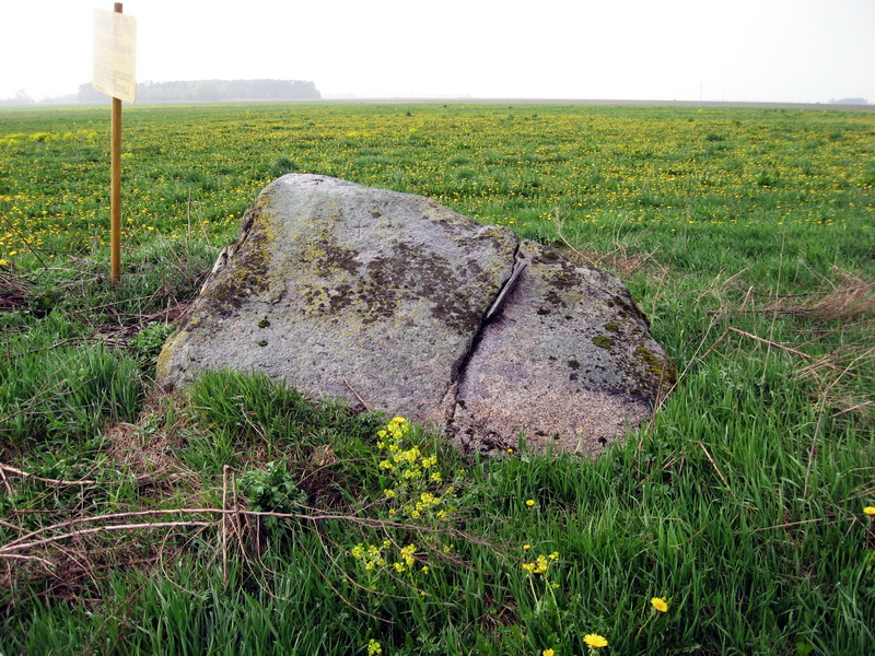 Барташы. Барташоўскі валун